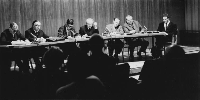 Zentralbild Hochneder 28.10.1966 Zur Woche des Buches Berlin: Lesetheater in der Stadtbibliothek eröffnet Das "Lesetheater in der Berliner Stadtbibliothek" öffnete am 27.10.1966 anläßlich der Woche des Buches zum erstenmal seine Pforten. Mit Rainer Kerndl's noch in Arbeit befindlichem Stück "Der verratene Rebell", gelesen von (v.l.n.r.:) Peter Marx, Fritz Diez, Ezard Haussmann, Werner Schulz-Wittan, Harald Halgardt, Fred Praski und Roman Silberstein, wurde das neue Forum der sozialistischen Gegenwartsdramatik eröffnet; weitere Berliner Autoren werden hier künftig neue Werke vorstellen.